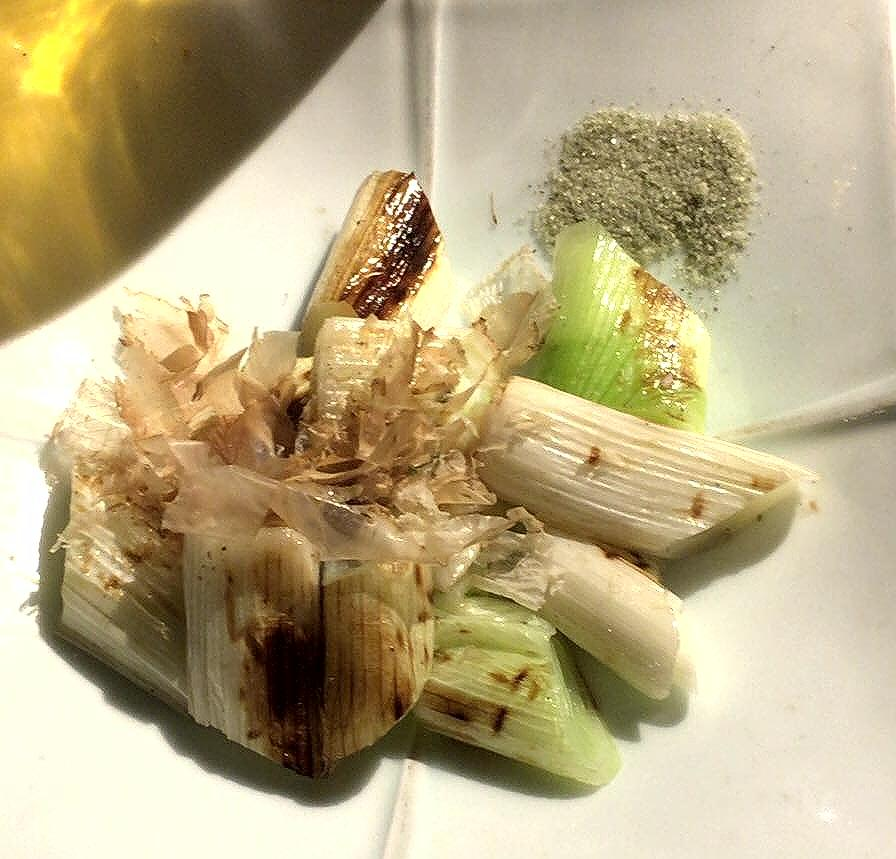 千寿ネギ焼き 一歩一歩